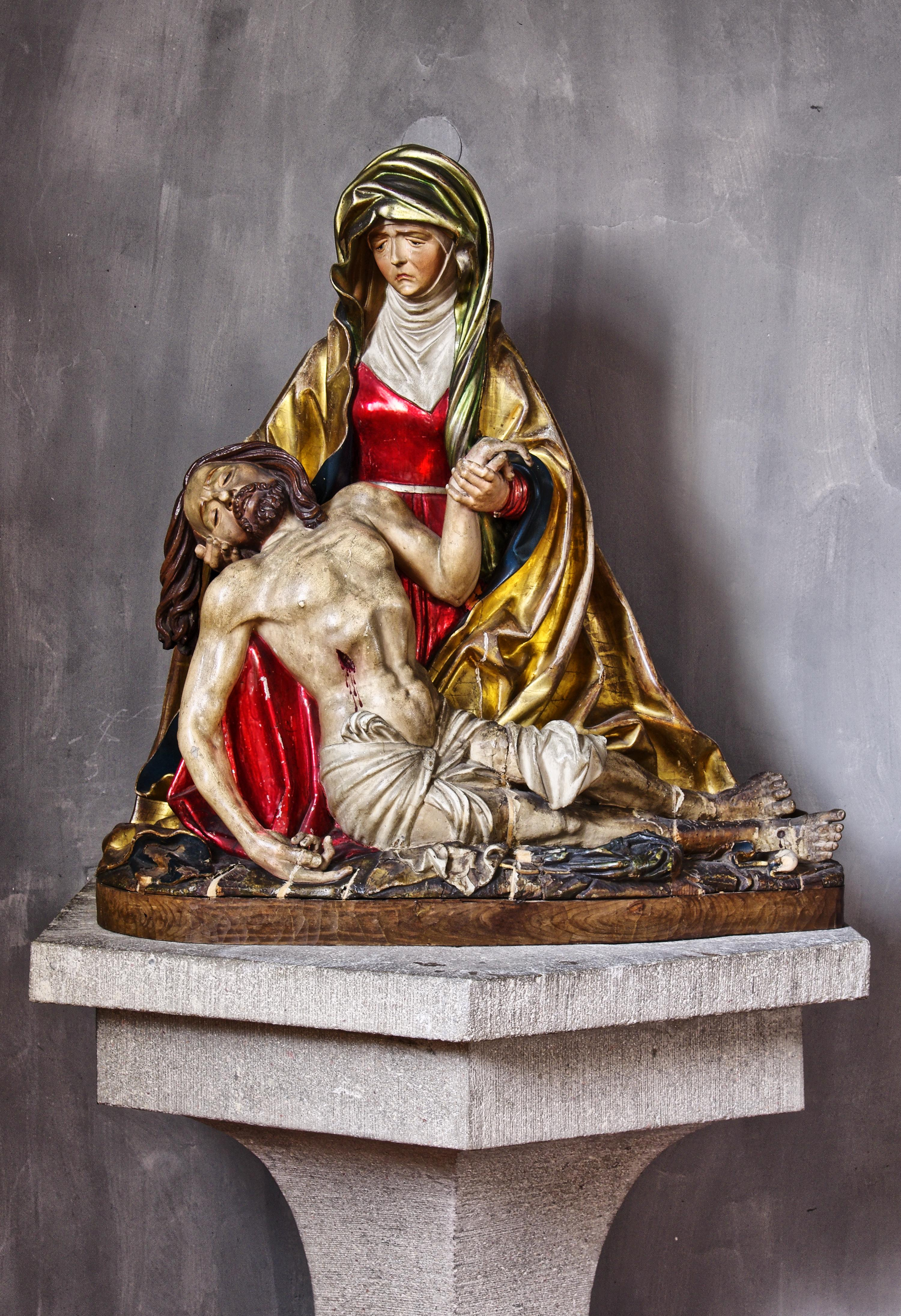 Bilder aus der Kirche St. Martin in Staufen im Breisgau